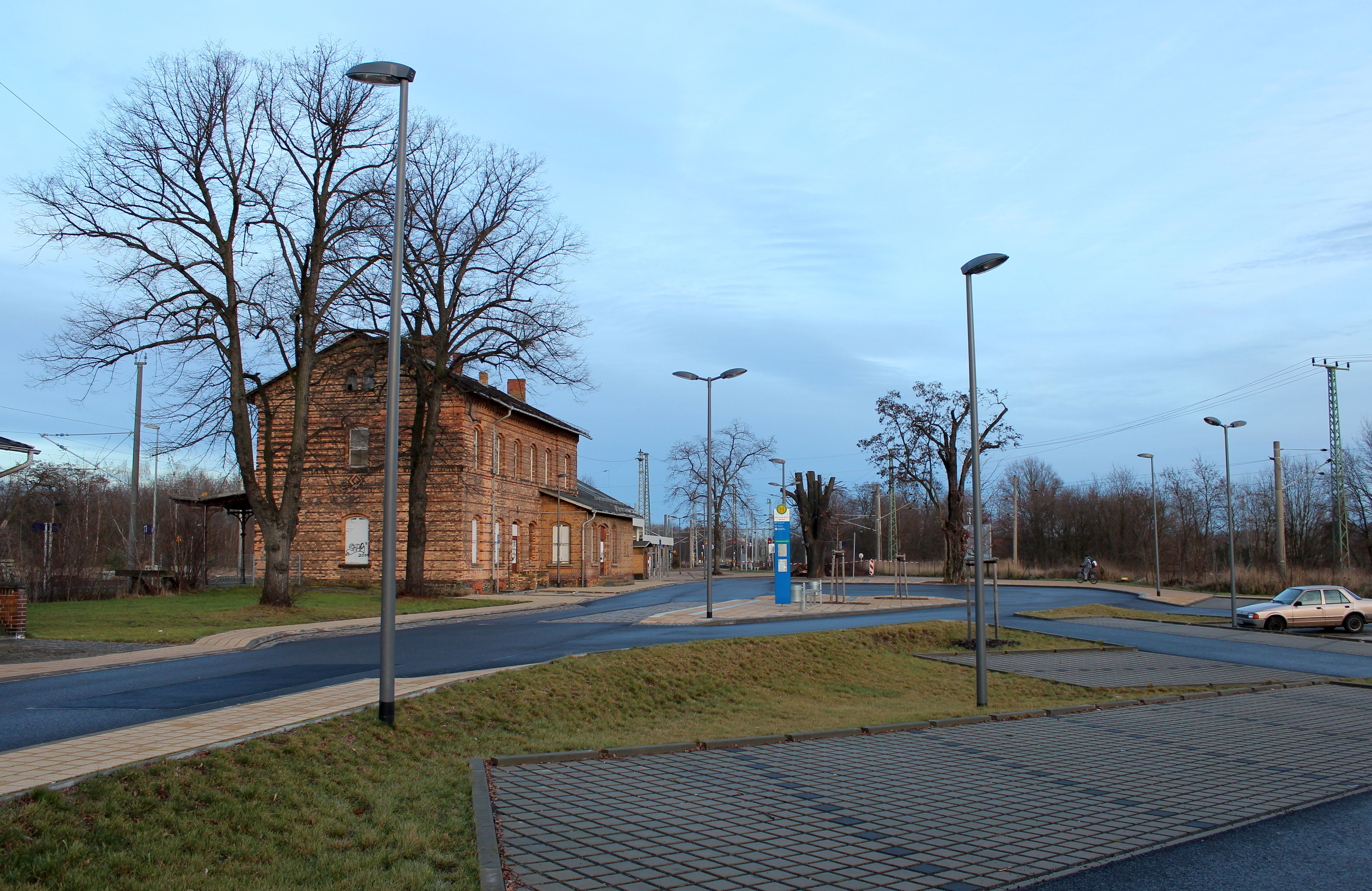 Bahnhof Elsterwerda-Biehla.